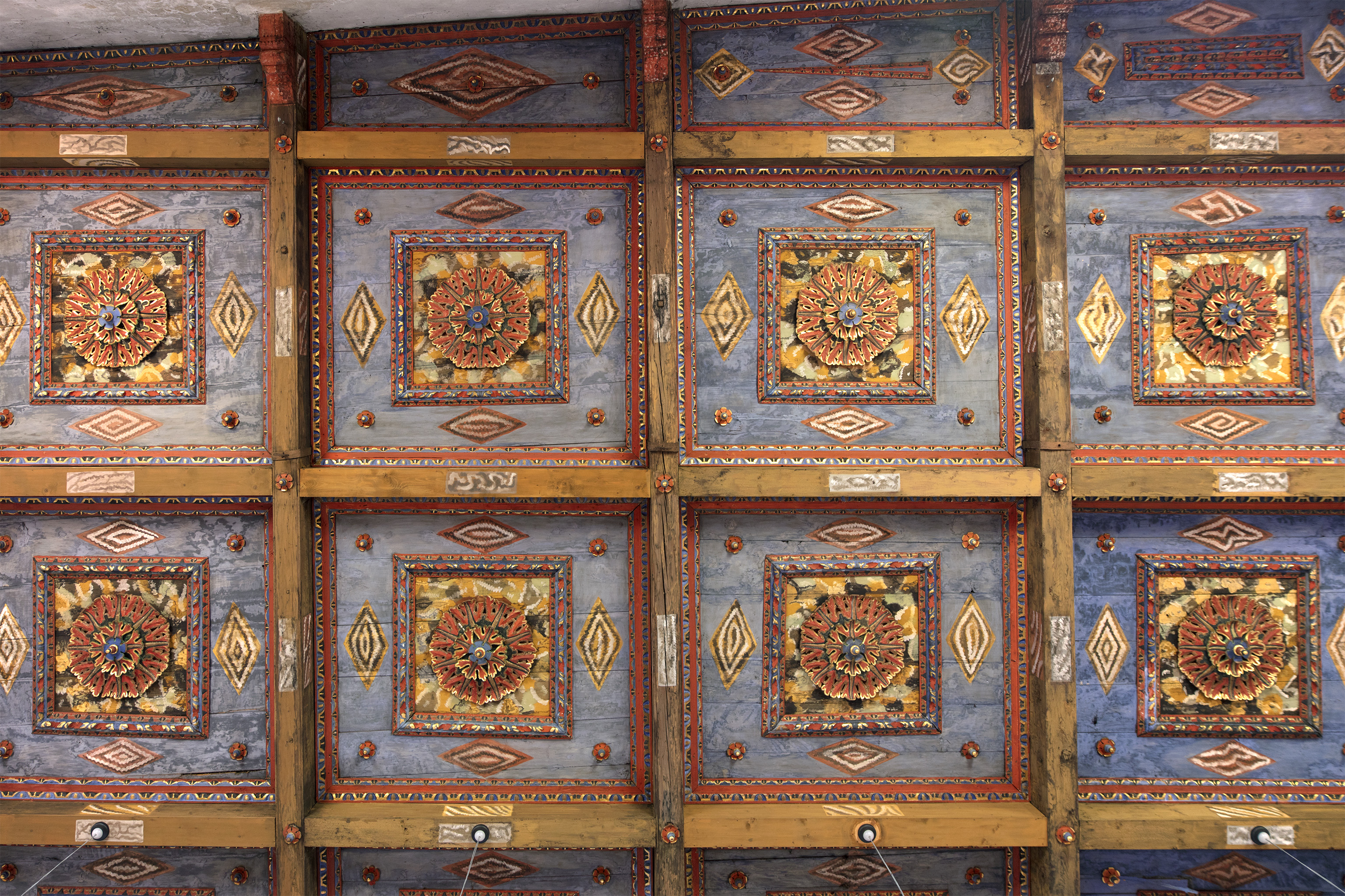 Ausschnitt der Kassettendecke der Kirche Sta. Maria Assunta Calanca